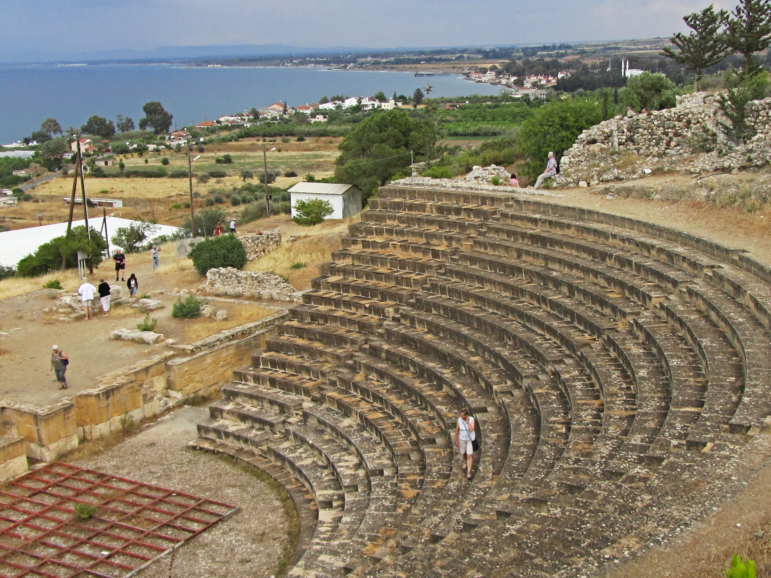 Römisches Amphitheater Soli